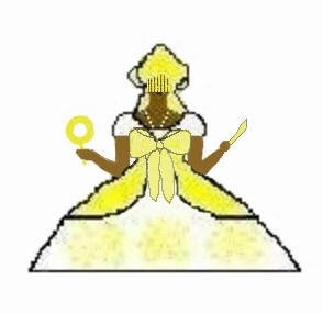 Icone Oxum Candomblé